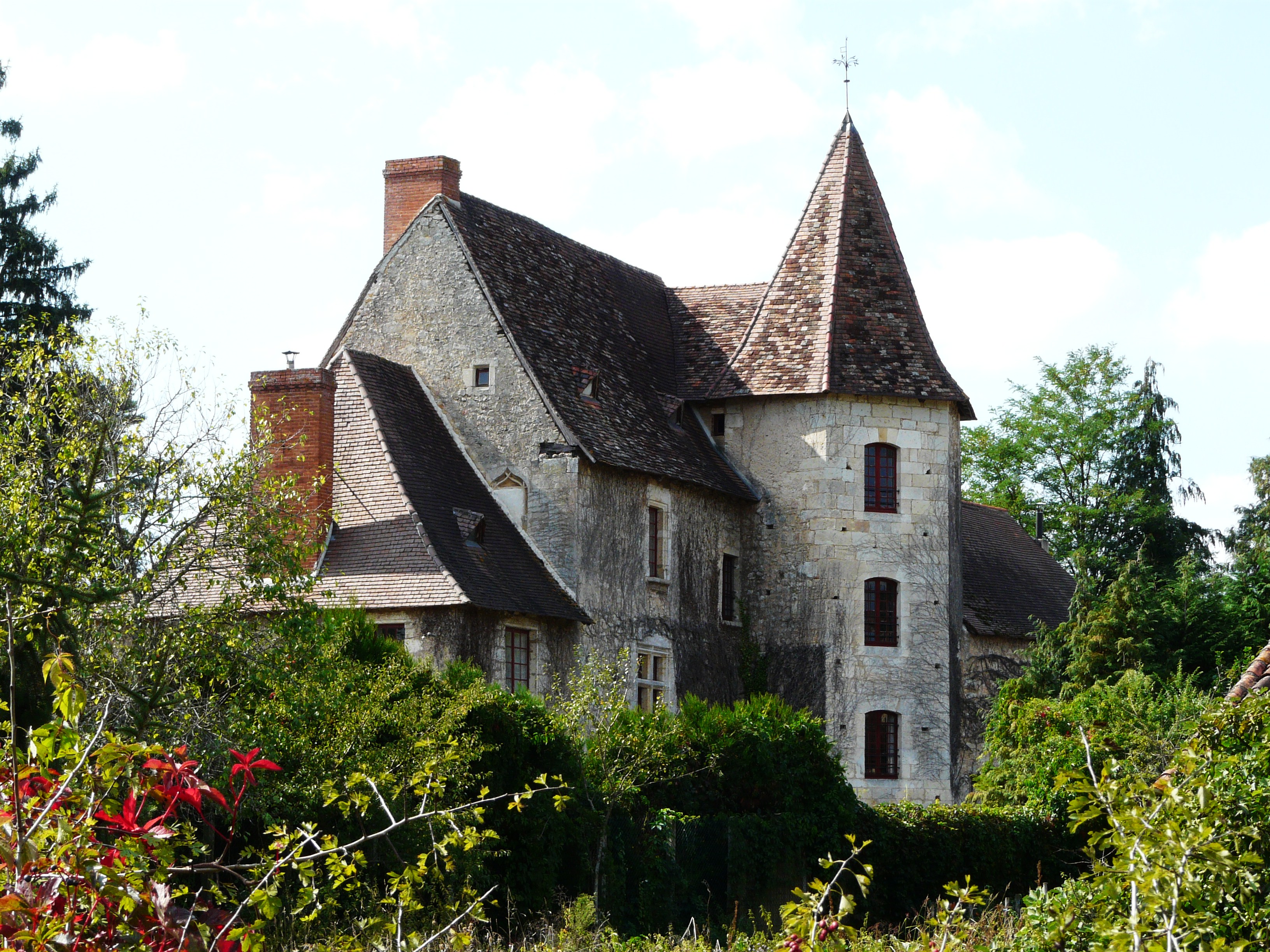 Le manoir de Grézignac vu du sud-est, Sarliac-sur-l'Isle, Dordogne, France